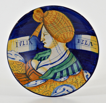 Piatto con scritto: "Iulia bela". Faenza XVI secolo